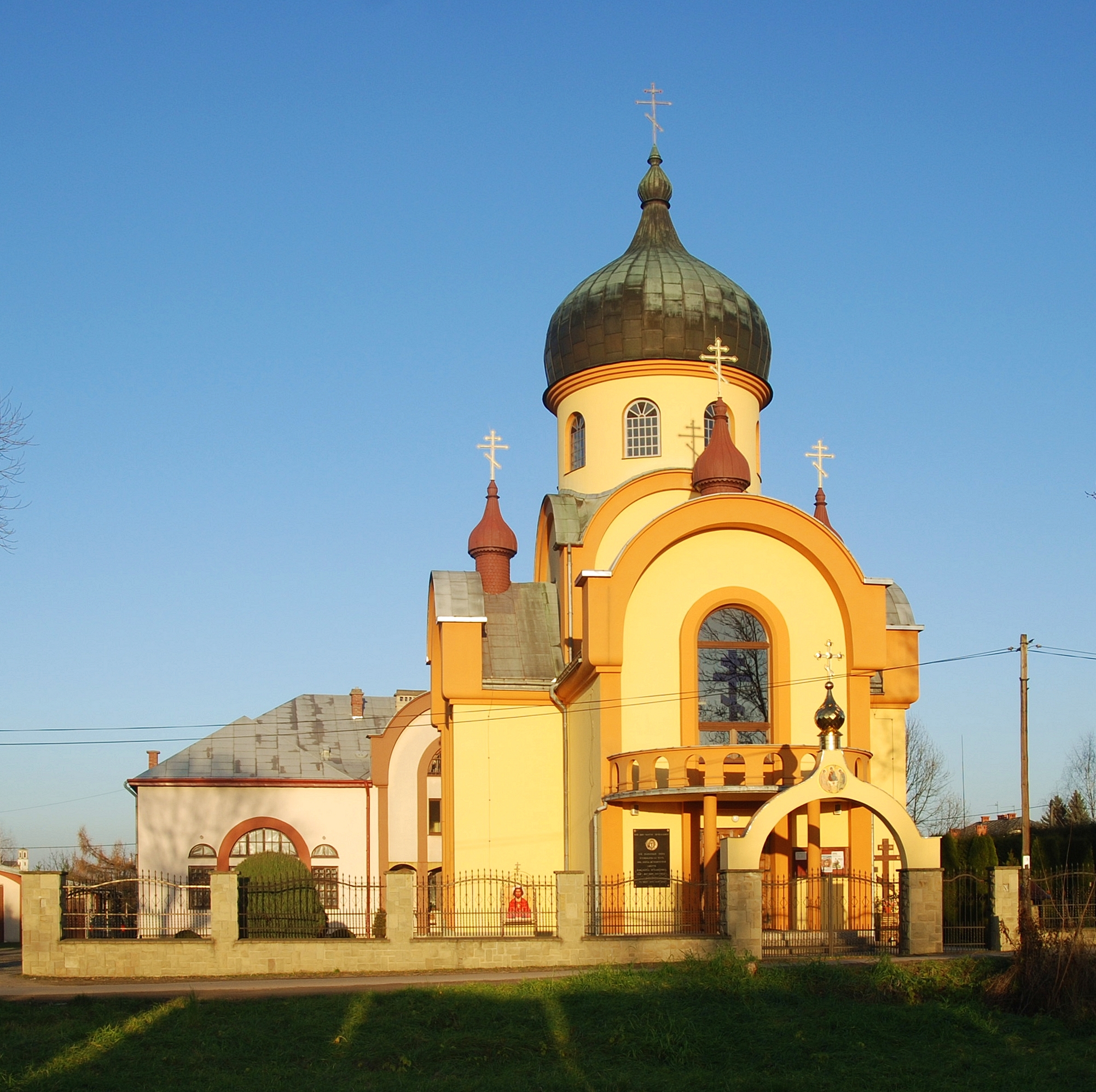 miasto Gorlice